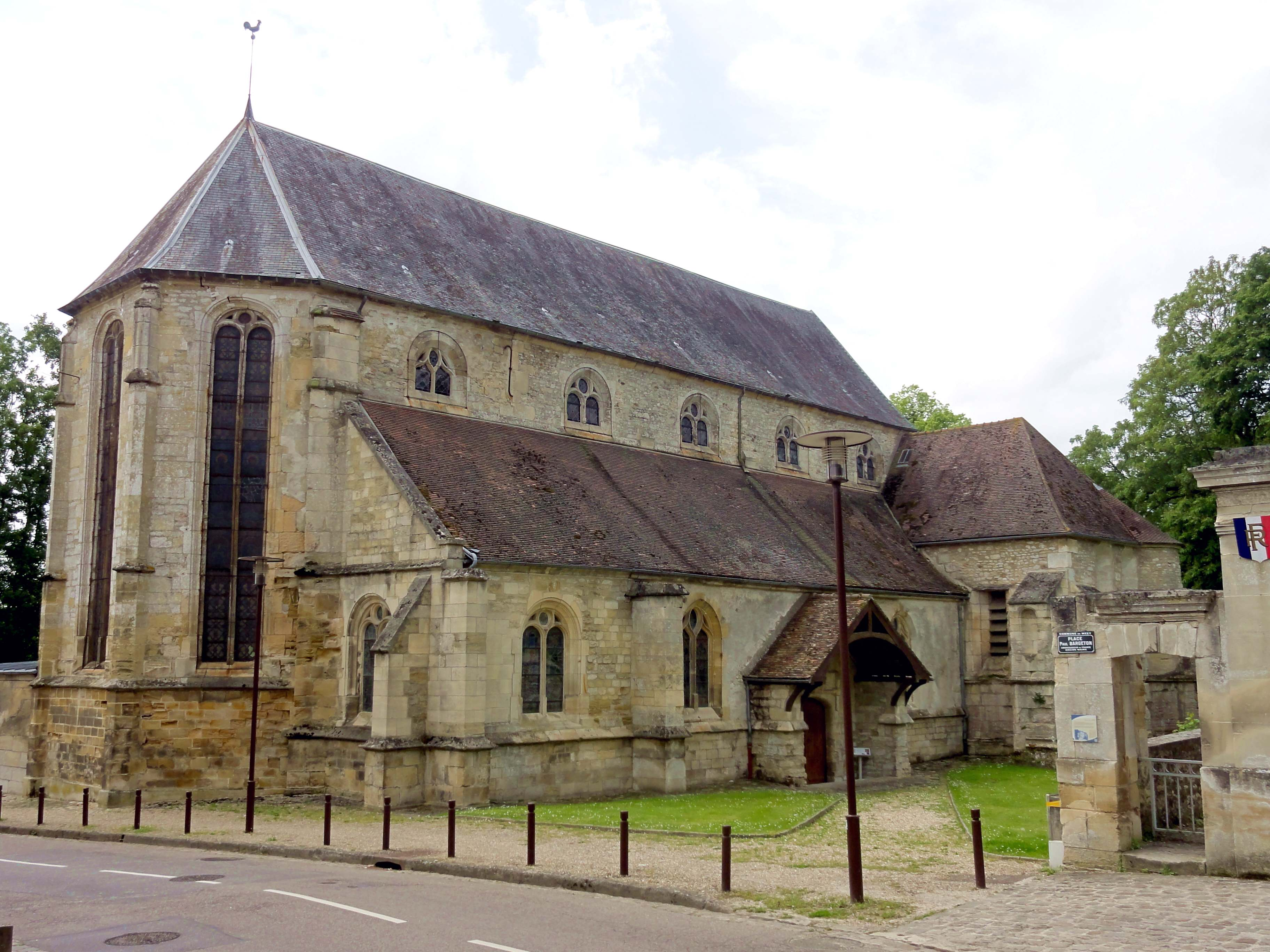 Église Saint-Germain de Mézy-sur-Seine - voir titre.